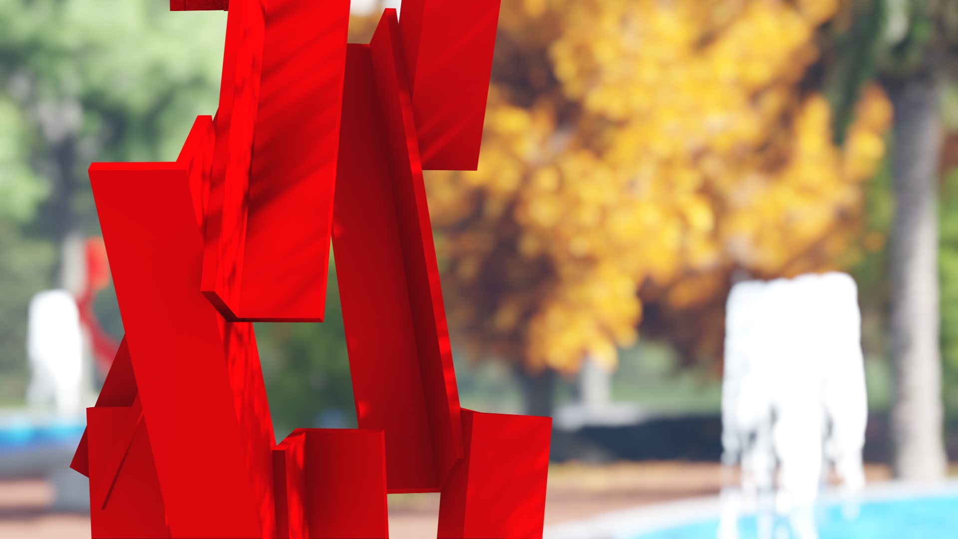 Escultura "Arbre Vermell" - autors: Daniel Navas, Neus Solé